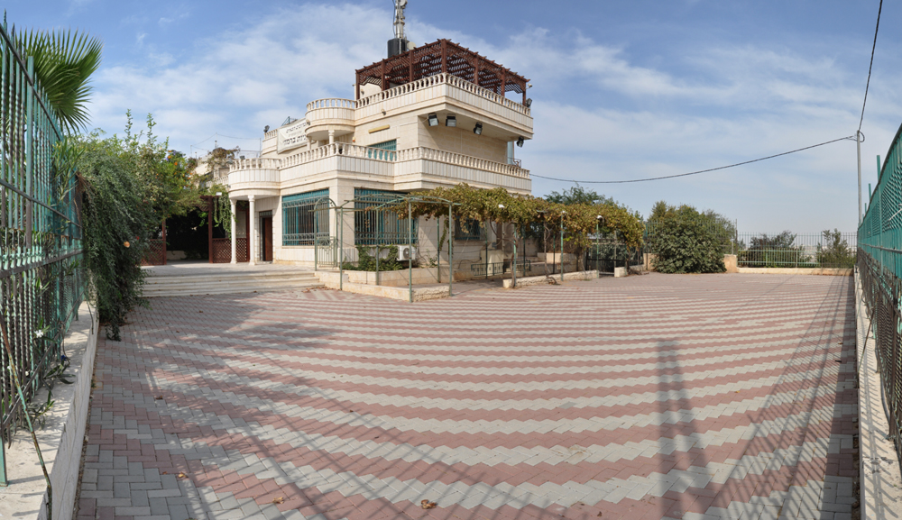 מרכז המבקרים של ראשית ירושלים בנבי סמואל